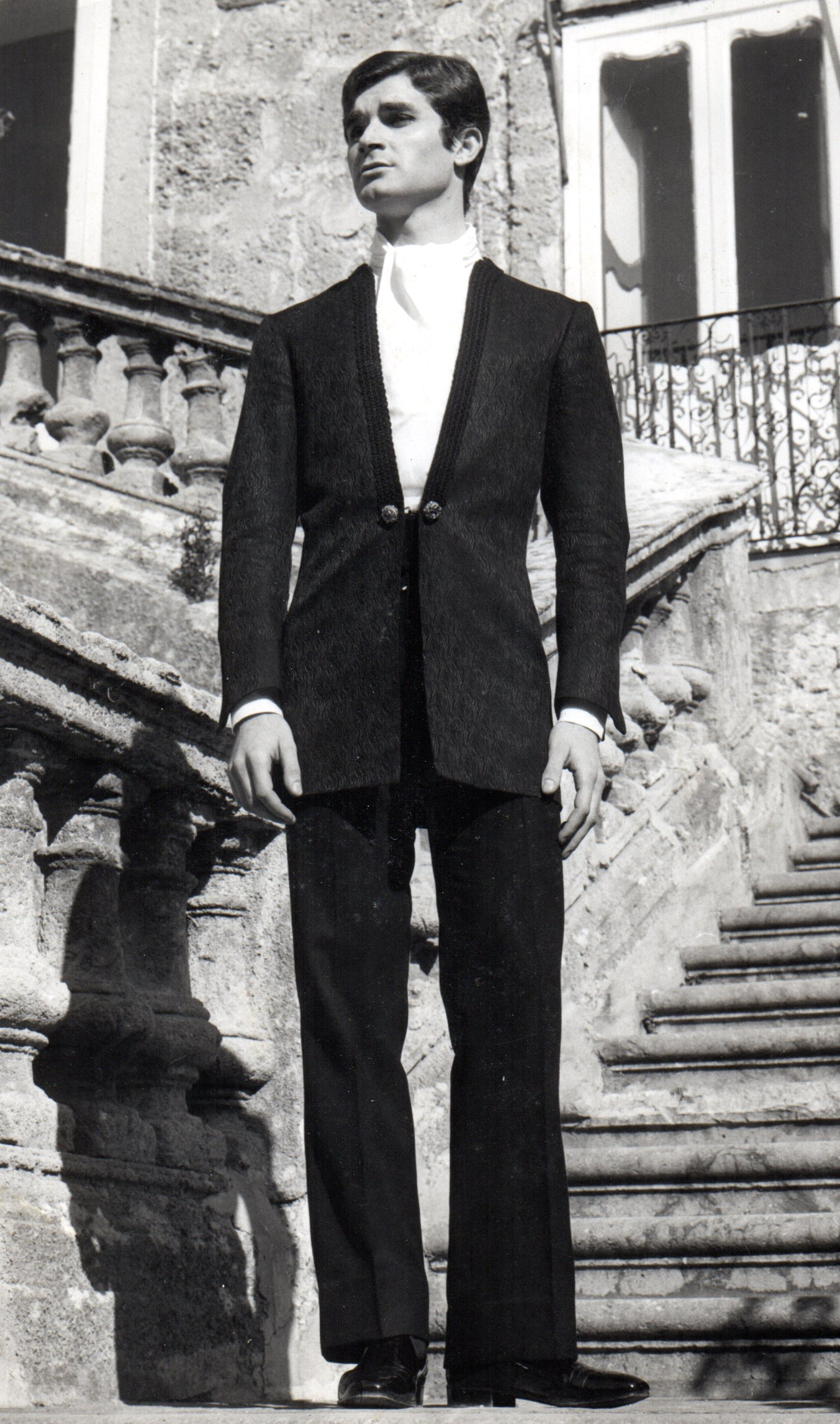 Francesco Elio Bruno nel 1968. Palermo, Villa Boscogrande.